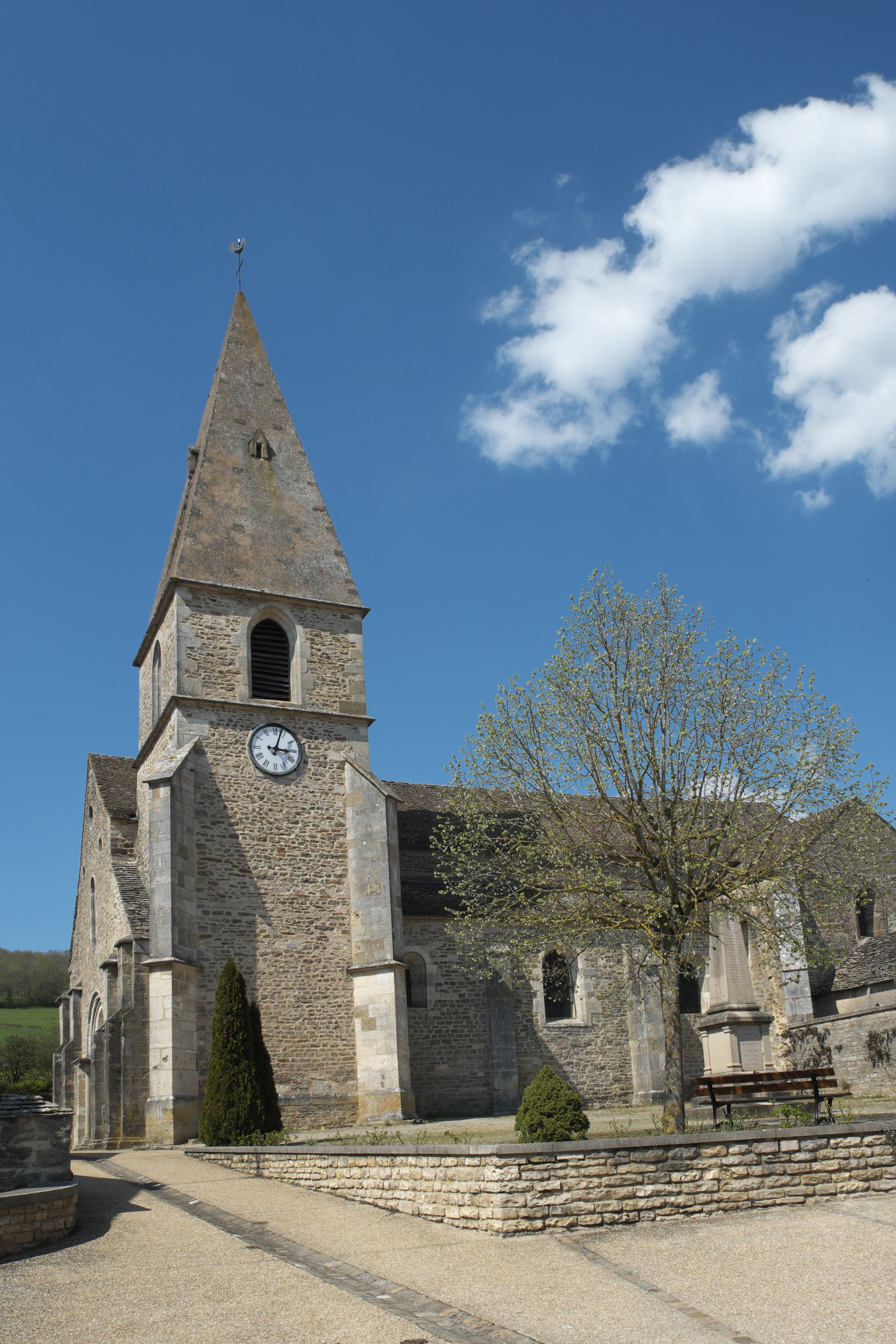 Katholische Pfarrkirche Notre-Dame-de-la-Nativité, früher Saint-Georges, in La Rochepot im Département Côte-d’Or (Bourgogne-Franche-Comté/Frankreich)